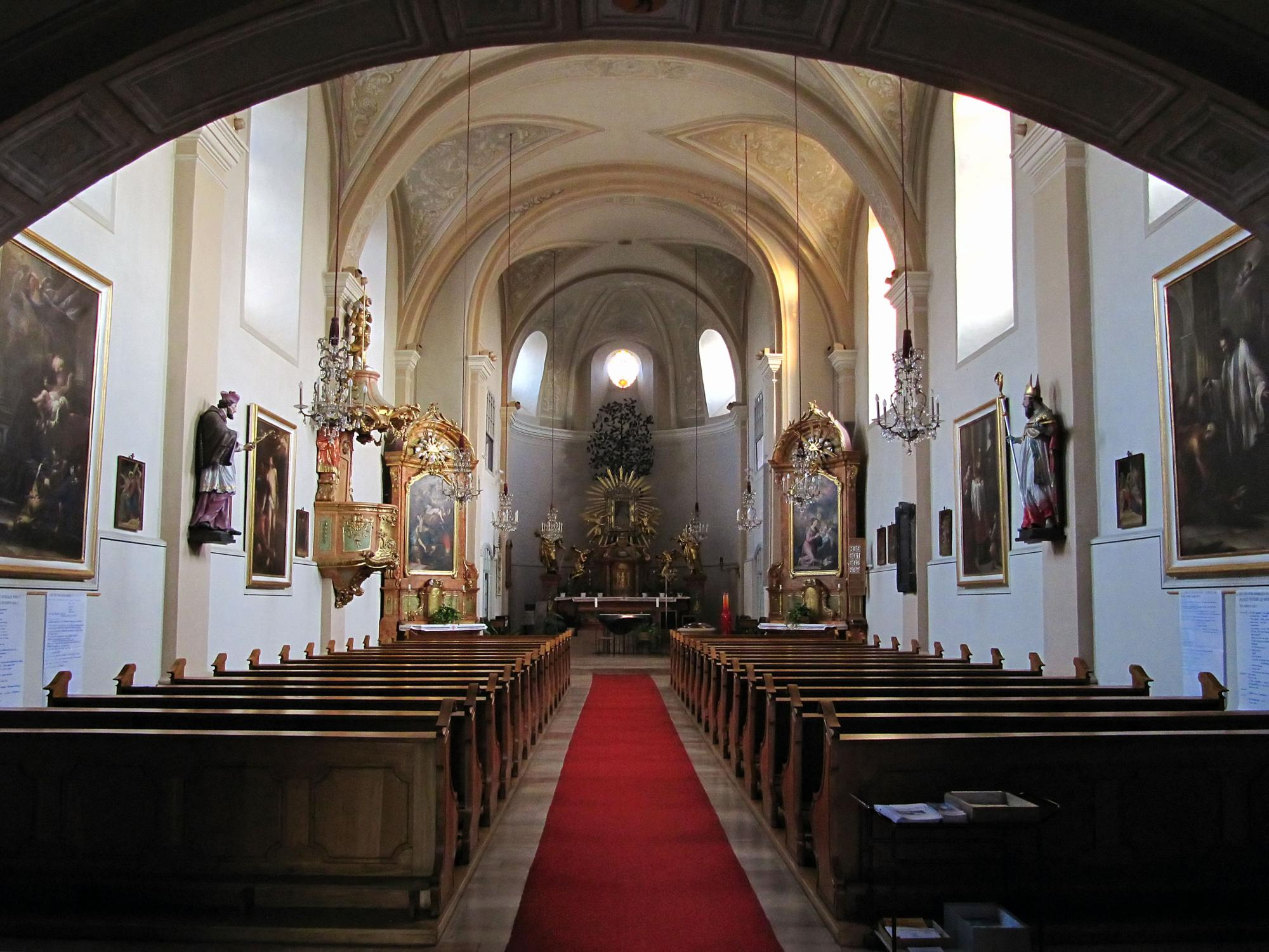 Kath. Pfarrkirche, hll. Peter u. Paul, Wallfahrtskirche Maria am Baum, Kaiserebersdorf.